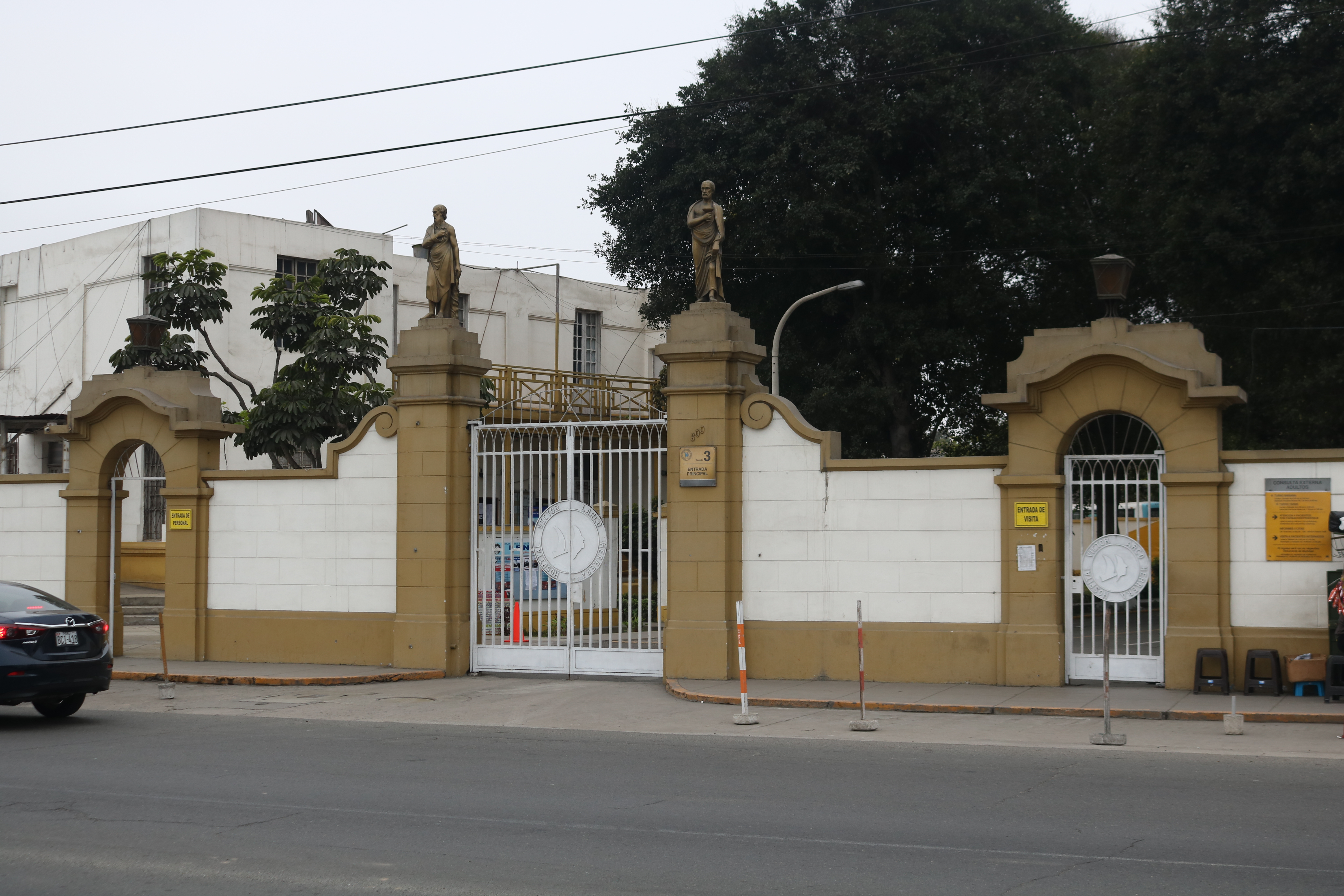 Entrada del Hospital Víctor Larco Herrera en la Av. del Ejercito (Lima, Perú)